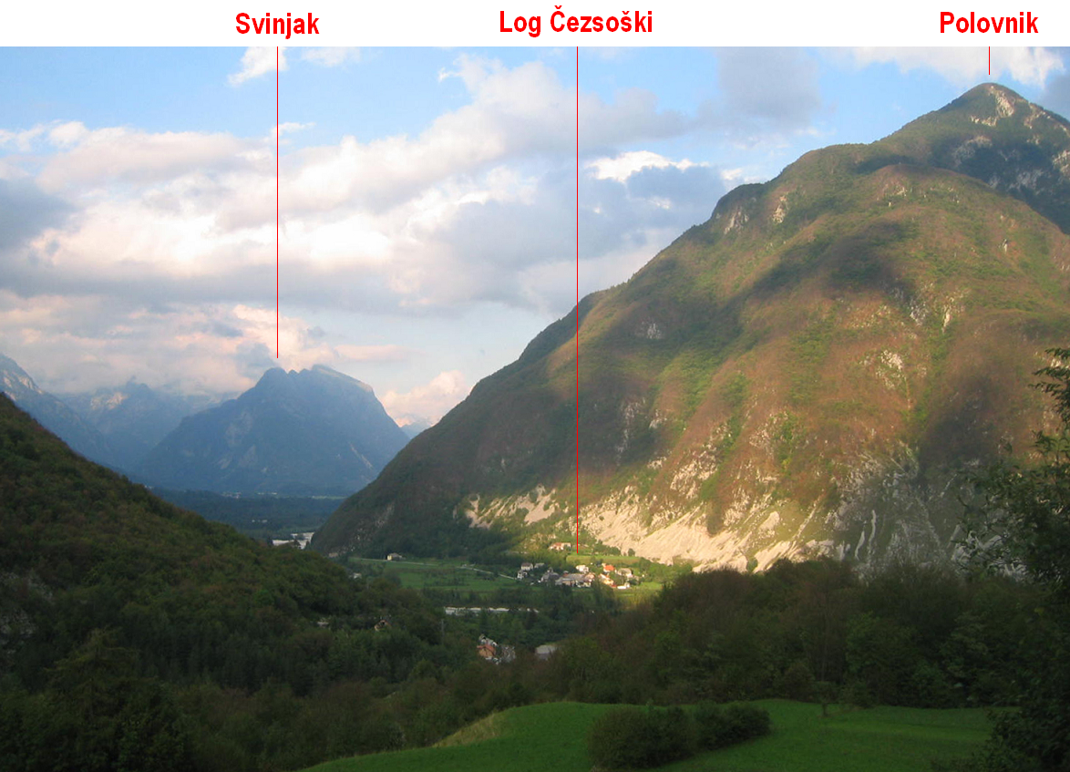 Log Čezsoški, village in northern Slovenia photo:Ziga 06:39, 7 November 2006 (UTC)